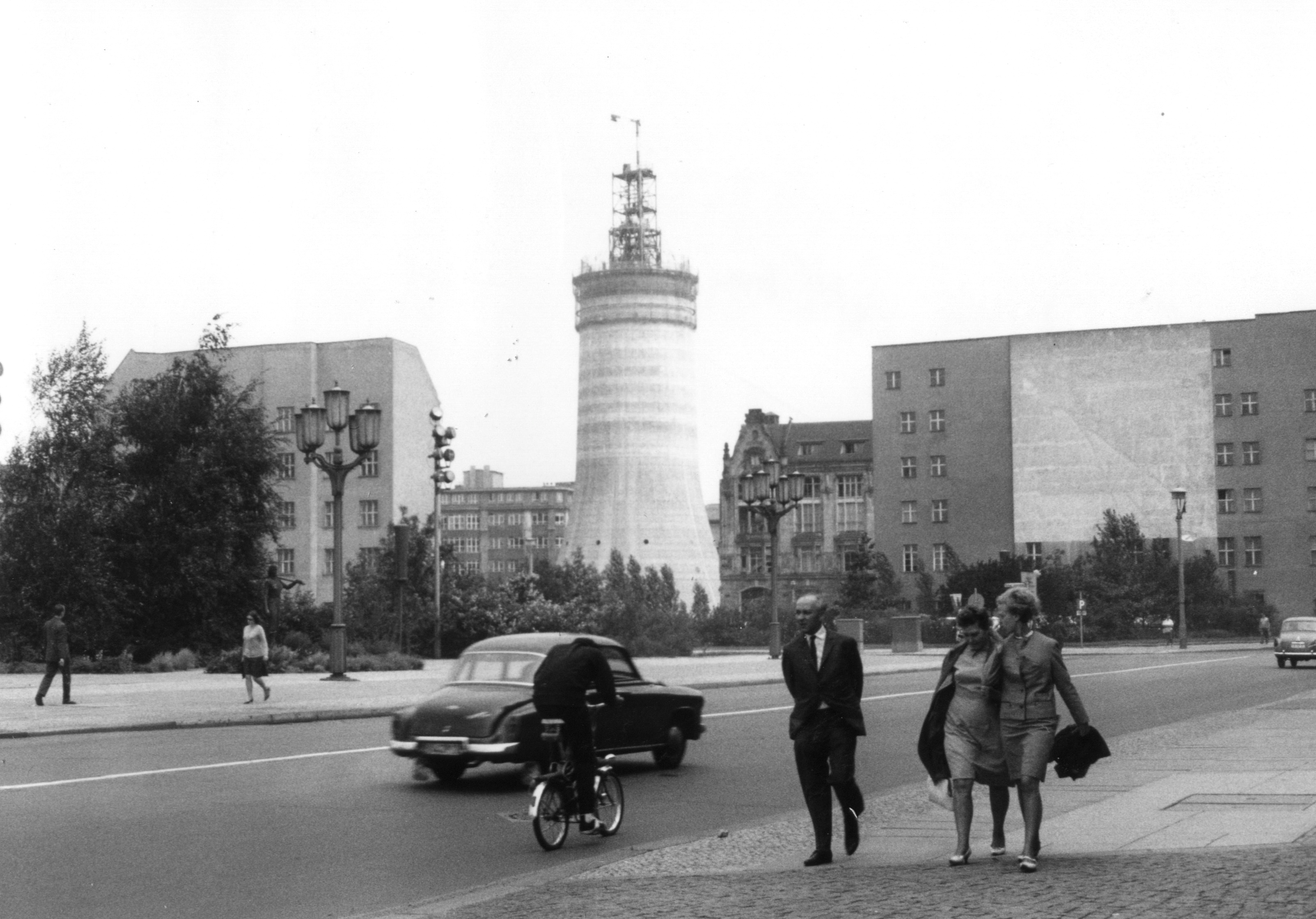 Stumpf des Fernsehturms Berlin